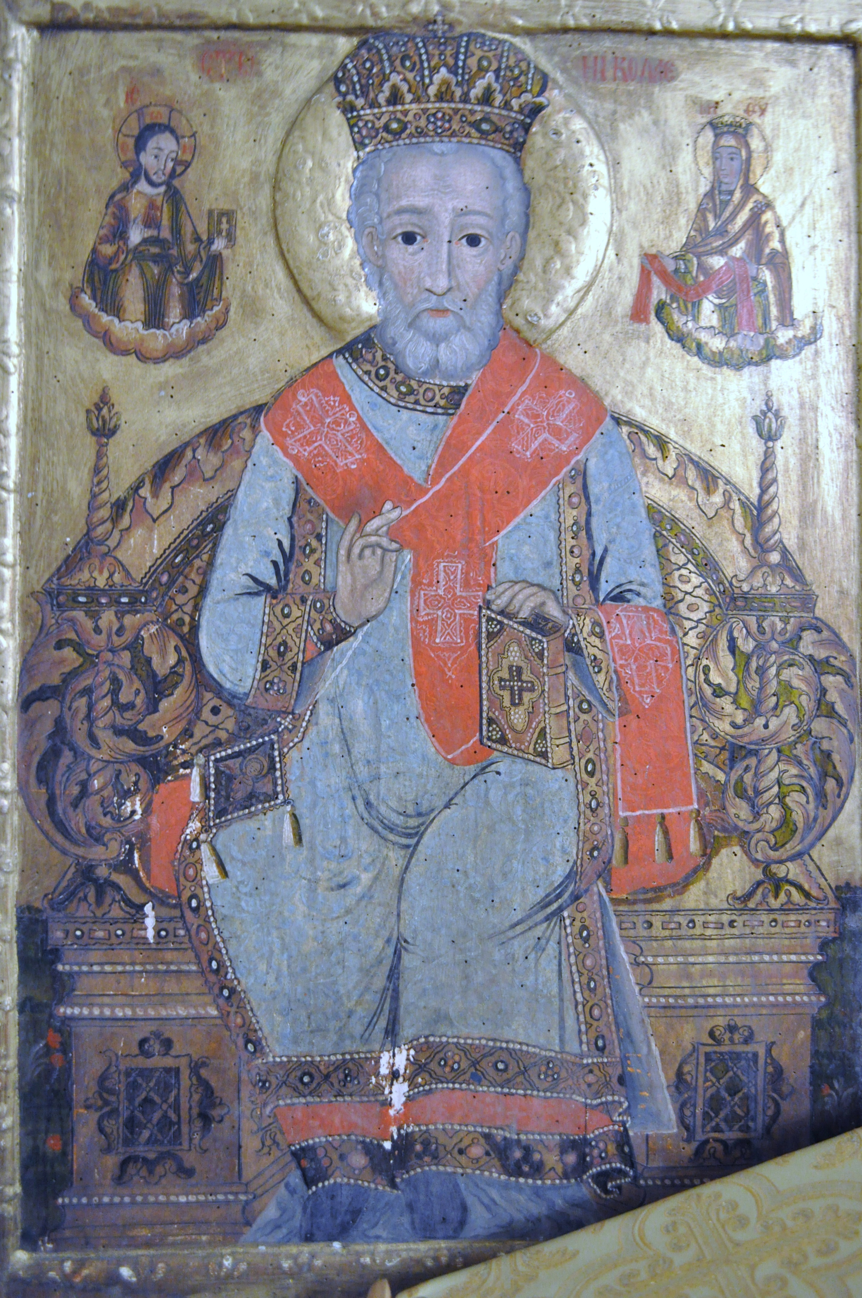 Biserica de lemn „Adormirea Maicii Domnului”,sat STĂNIJA; comuna BUCEŞ